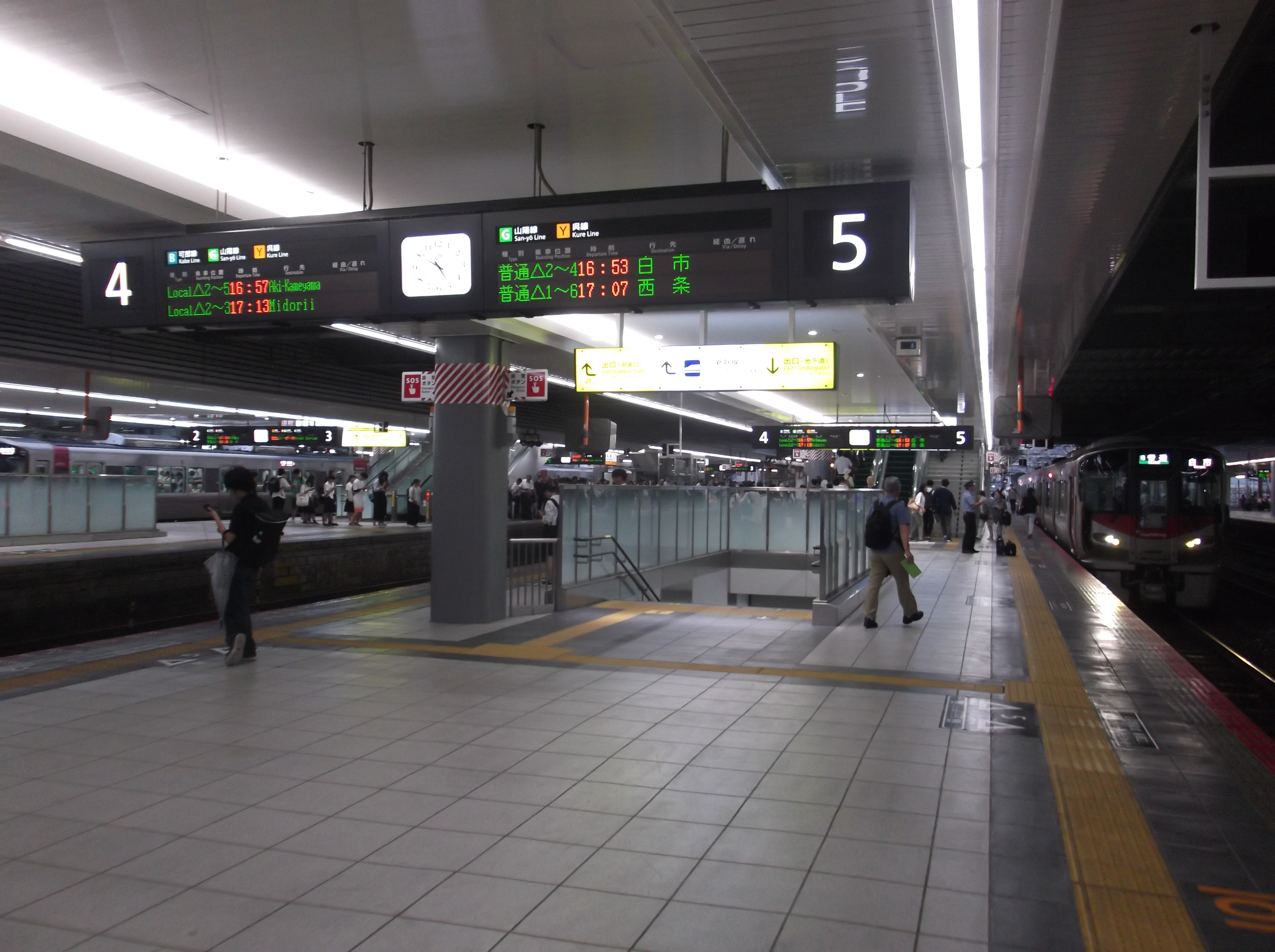 広島駅３号ホームを東側（西条方）から西側（岩国方）に望む